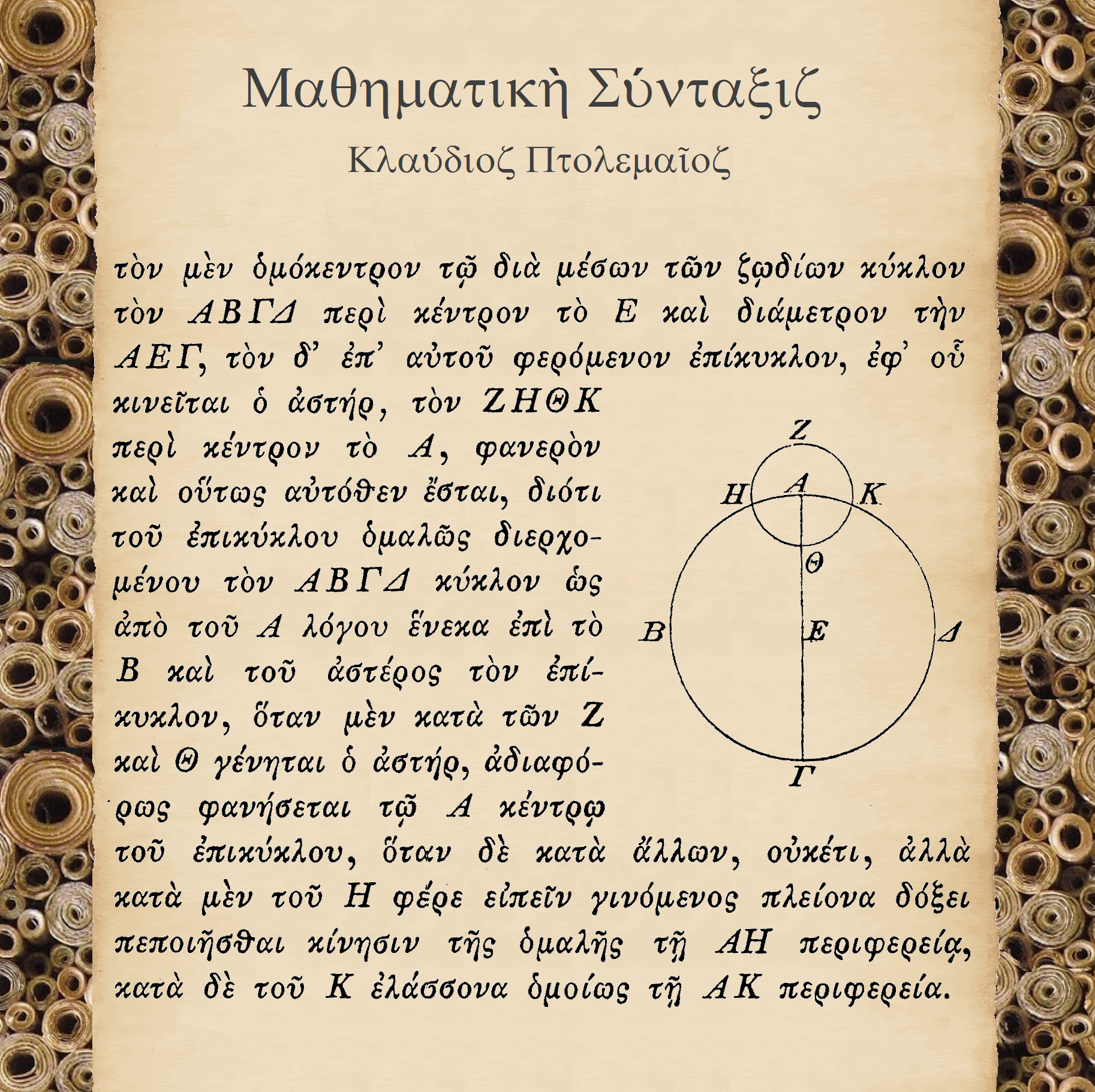 Detalle del Almagesto de Claudio Ptolomeo, transcripto al griego por Johan L. Heiberg. Libro III Capítulo 4: Sobre la Hipótesis del Movimiento Circular Uniforme, "En la hipótesis del Epiciclo", Fig. 3.2.